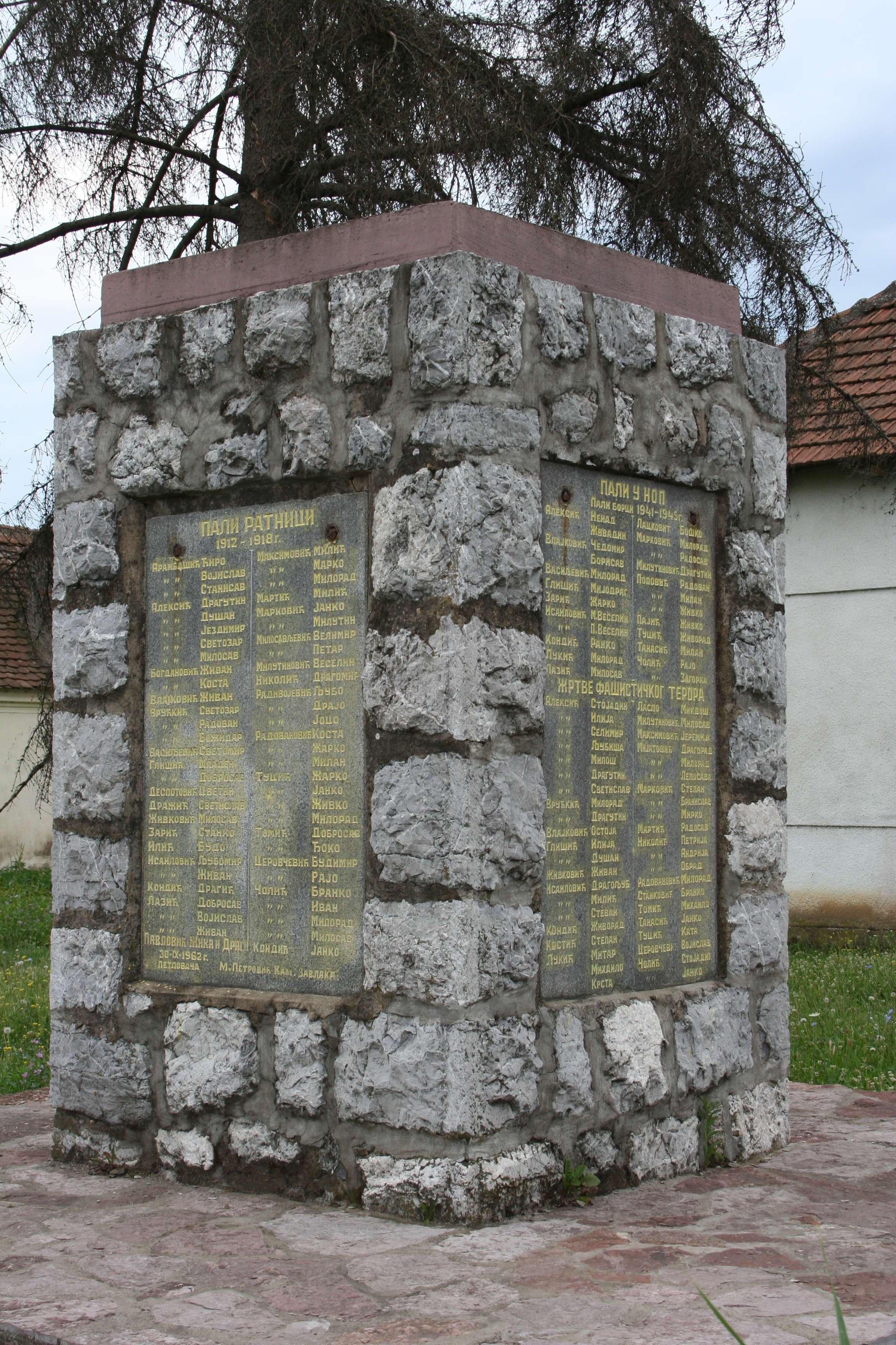 Spomenik u centru sela, Petlovača